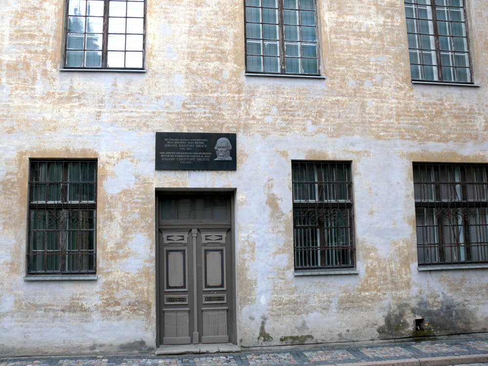 мемориальная доска известному рижскому просветителю Бротце